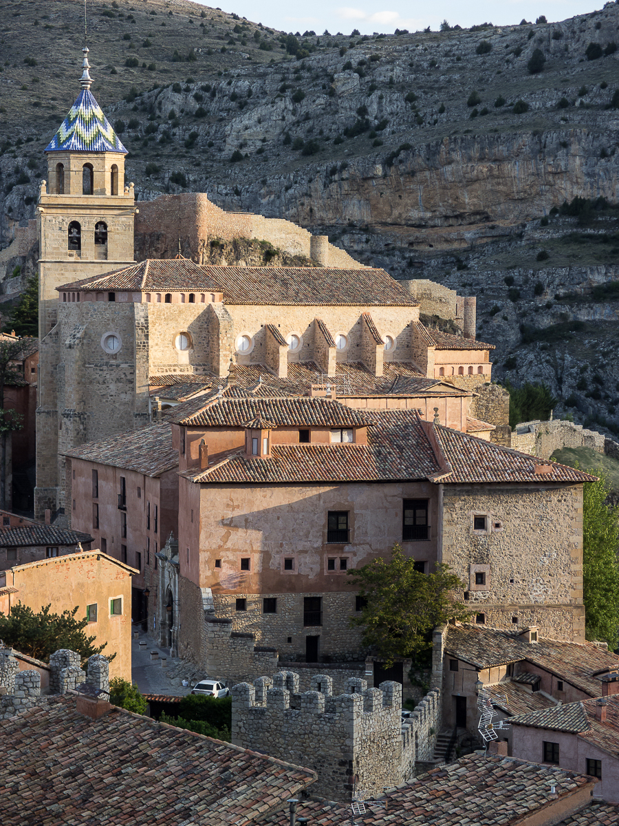 Albarracín 17052014 045